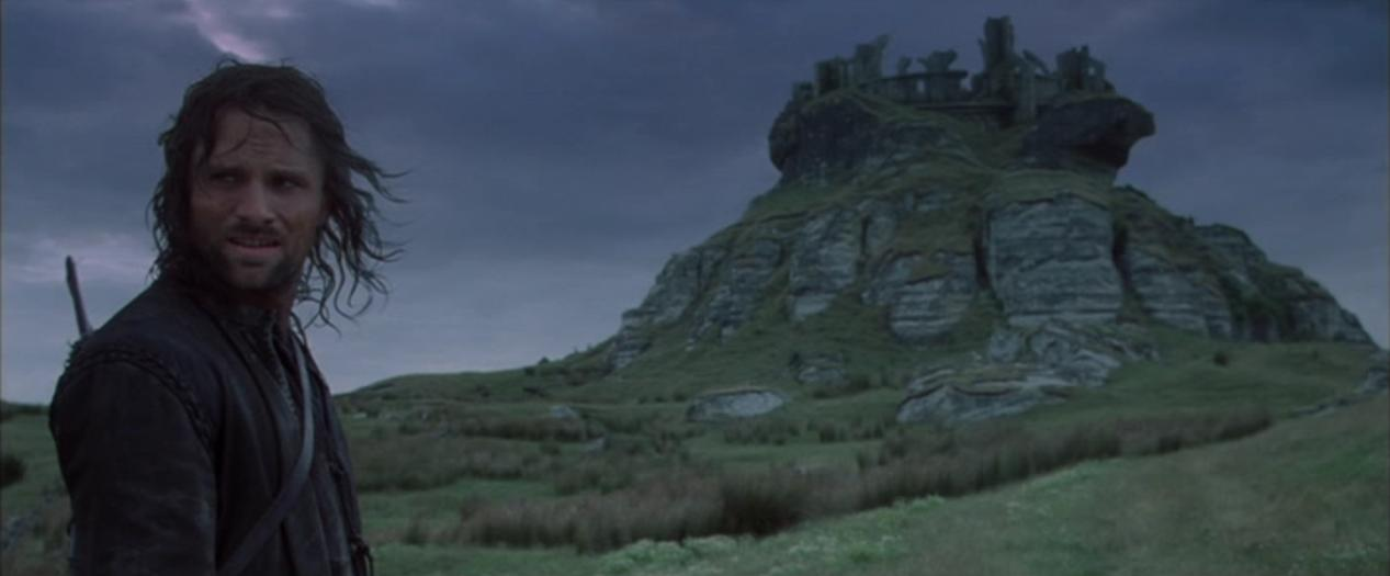 Interlingua: Amon Sûl (Colle Vento) ut appare in le version cinematographic de Le Senior del Anellos: Le Compania del Anello.